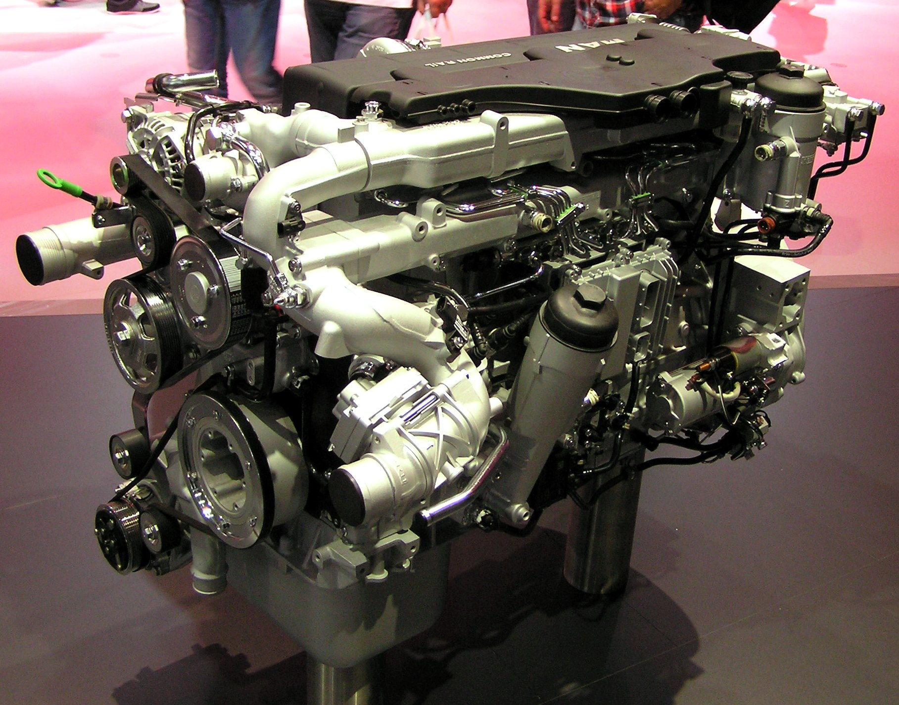 MAN Sechszylinder Dieselmotor, Typ D0836LFL66 (Dieselmotor für LKW)